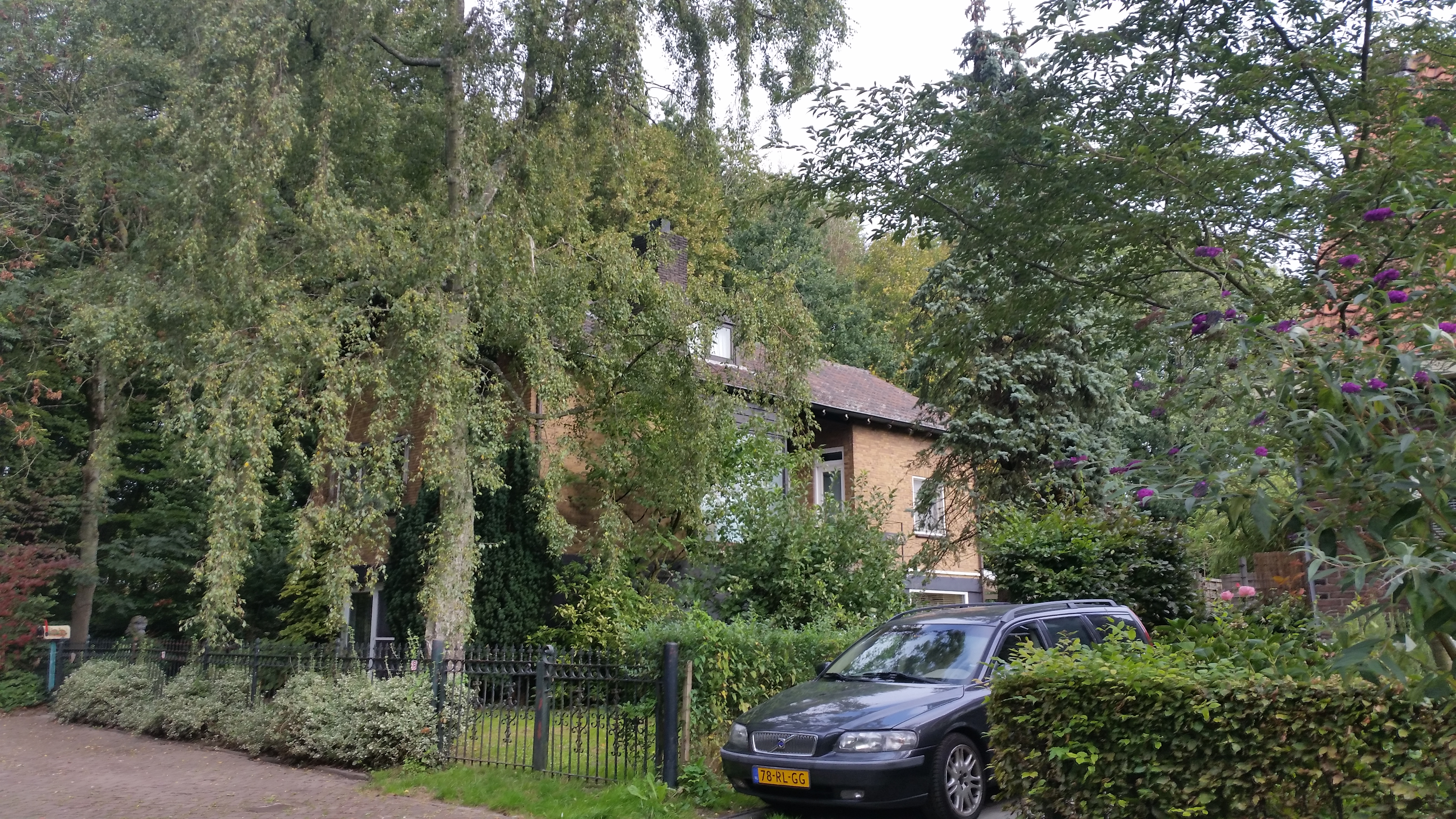 Melkweg (Street in Amsterdam), huisnummer 30